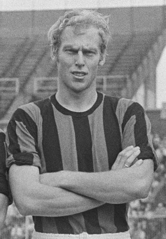 Collectie / Archief : Fotocollectie Anefo Reportage / Serie : DWS-FC Twente 1-3 Beschrijving : Het elftal van DWS, staand vlnr, Flinkevleugel, Soetekouw, Pijlman, Dijkstra, Overweg, Jongbloed, zittend vlnr, Smit, Geurtsen, Van der Vall, Seemann, Rensenbrink Datum : 18 augustus 1968 Locatie : Amsterdam, Noord-Holland Trefwoorden : elftallen, groepsportretten, sport, voetbal Persoonsnaam : Dijkstra, Jos, Flinkevleugel, Frits, Geurtsen, Frans, Jongbloed, Jan, Overweg, Niels, Pijlman, André, Rensenbrink, Rob, Seemann, Finn, Smit, Aad, Soetekouw, Frits, Vall, Kick van der Fotograaf : Fotograaf Onbekend / Anefo Auteursrechthebbende : Nationaal Archief Materiaalsoort : Negatief (zwart/wit) Nummer archiefinventaris : bekijk toegang 2.24.01.05 Bestanddeelnummer : 921-6055